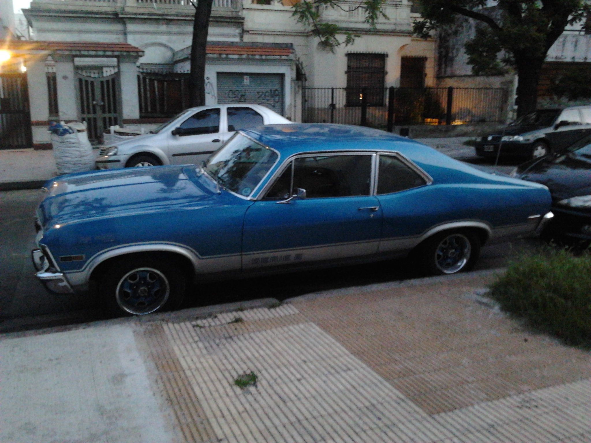 Chevy Serie 2 1978